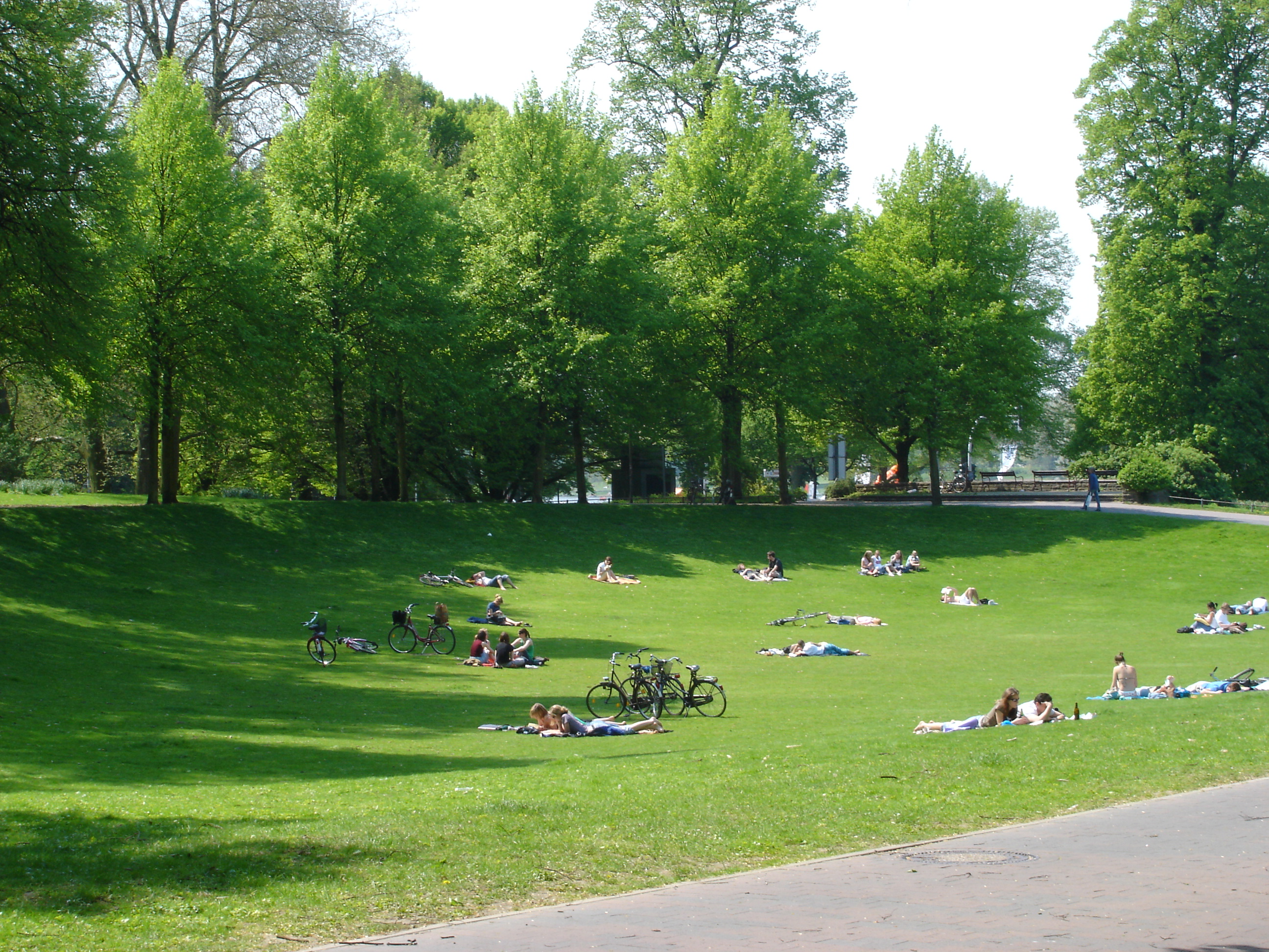 Panorama der Promenade am Aegidiitor in Münster, Westfalen, Deutschland